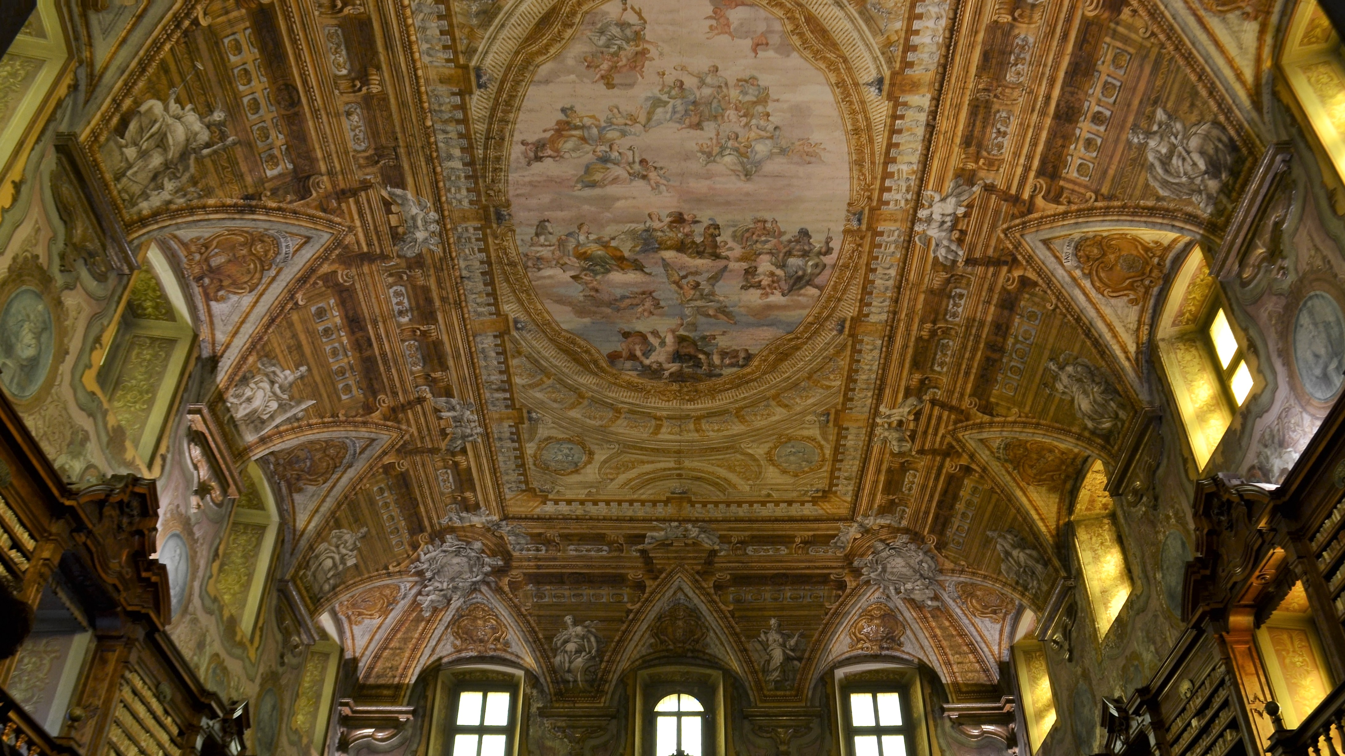 Sala Giambattista Vico. Soffitto.